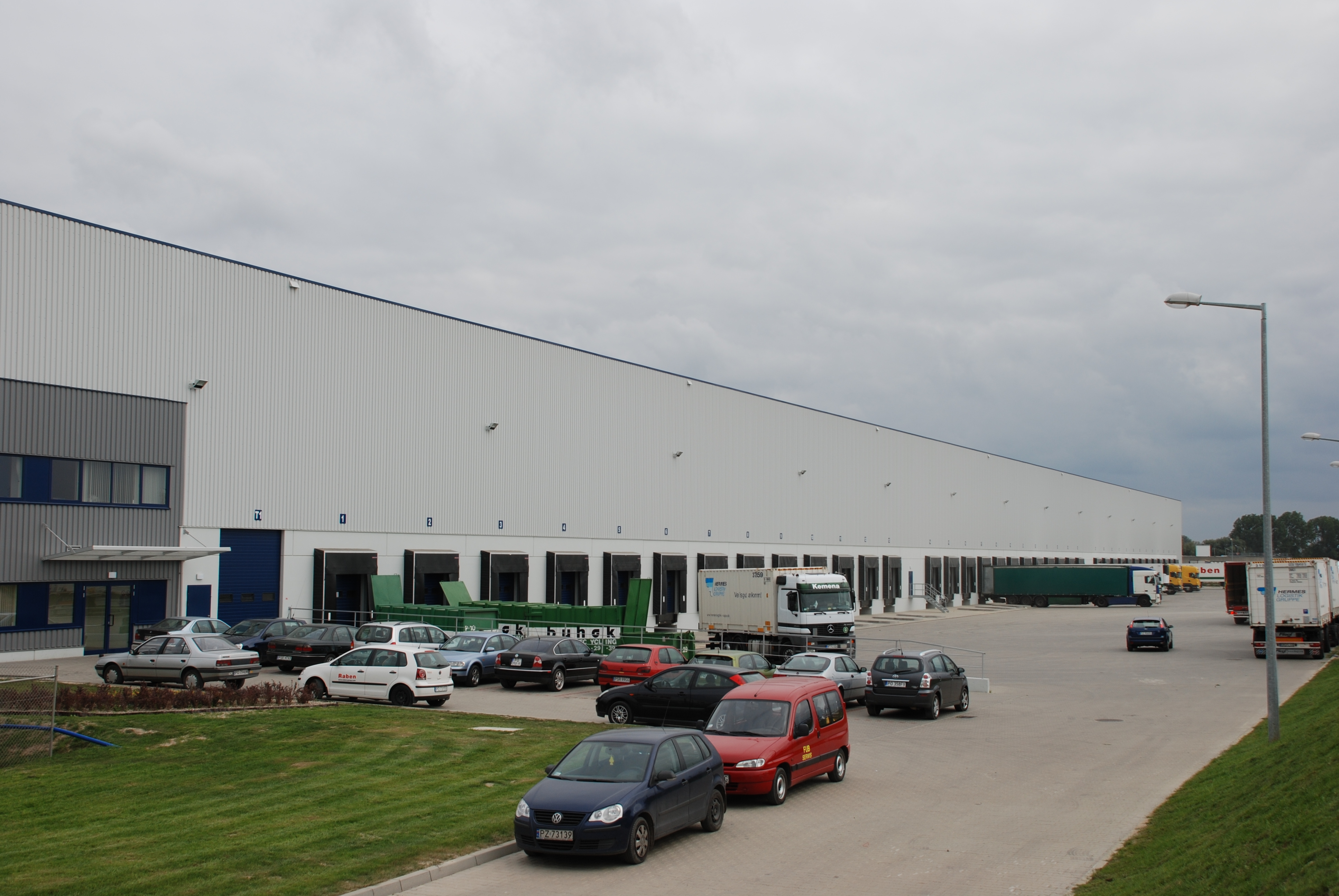 Hala w Rabenie